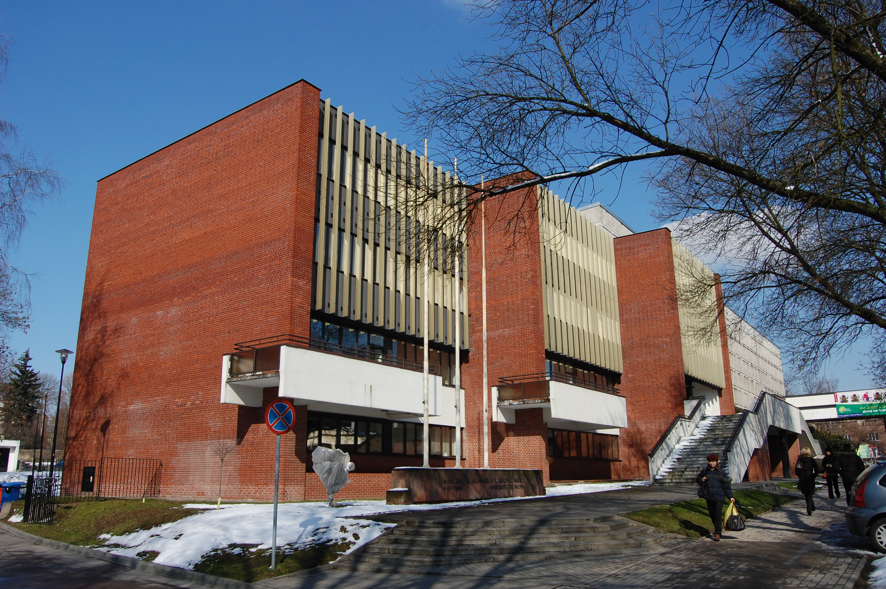 UMCS w Lublinie, nowa część biblioteki głównej